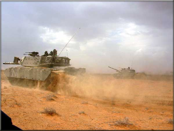 טנק מג"ח של חטיבה 130